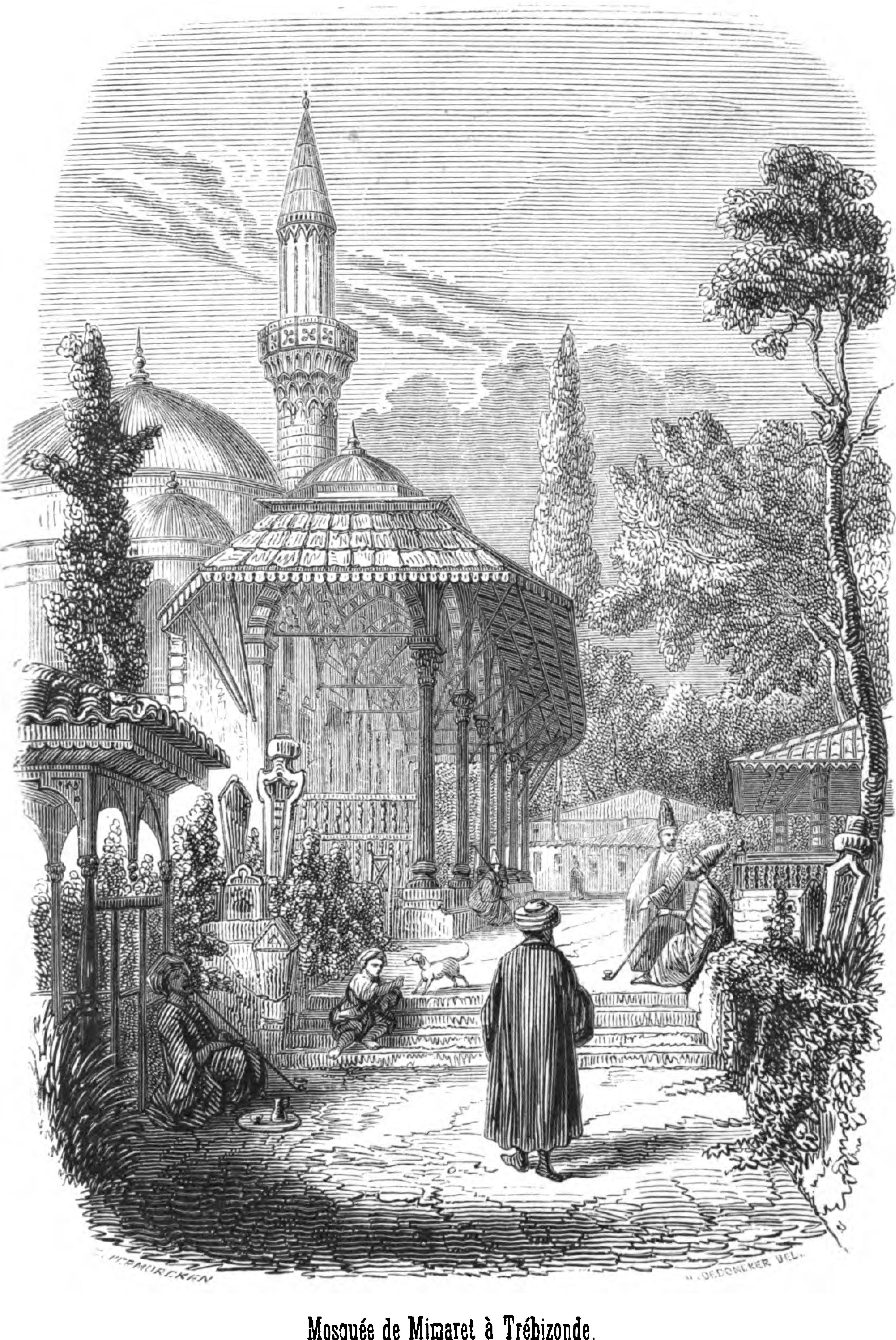 Mosquée de Mimaret à Trébizonde. Adolphe Laurent Joanne, Voyage en Orient, Volumes 1-2